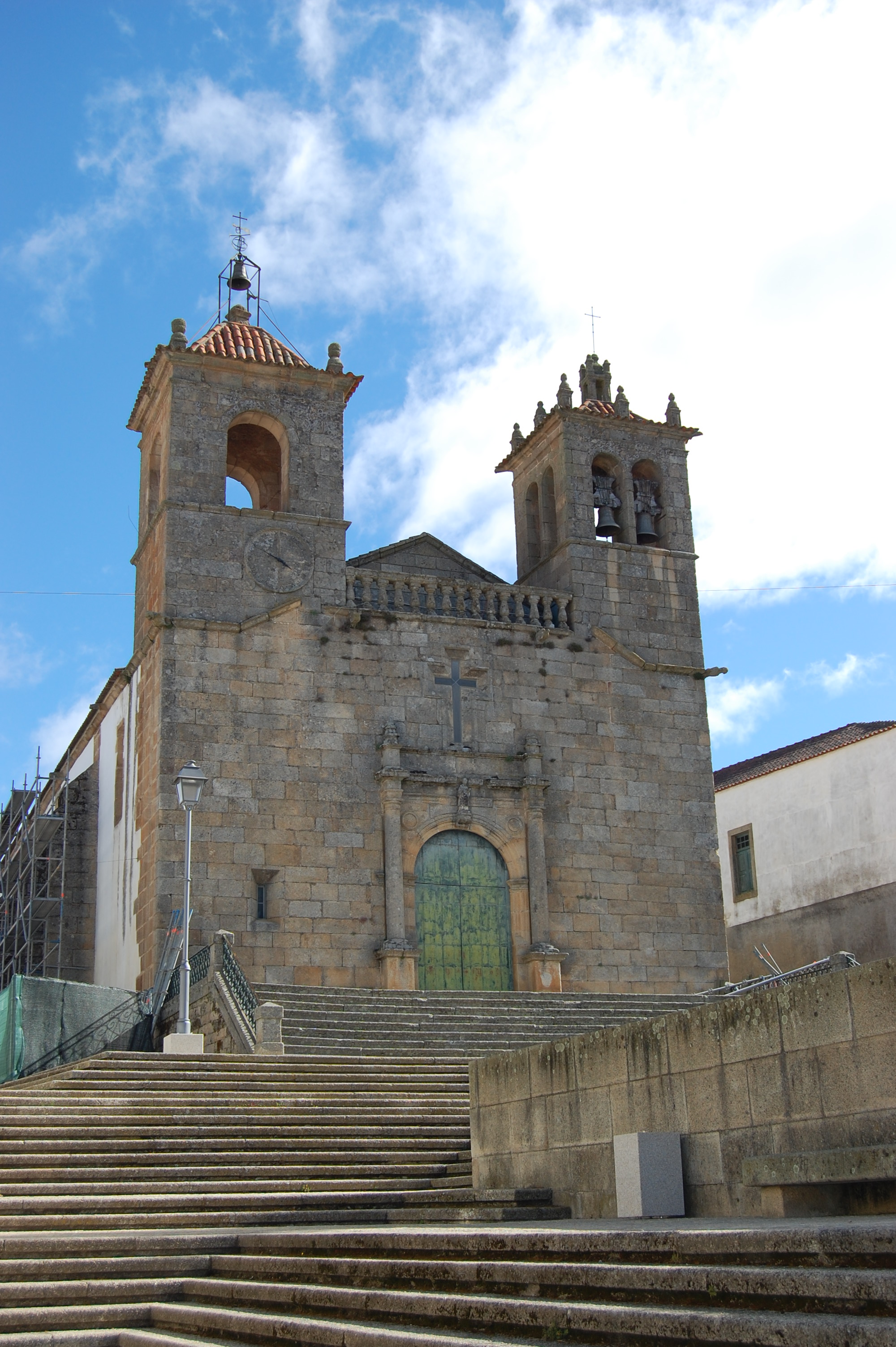 Vimioso.